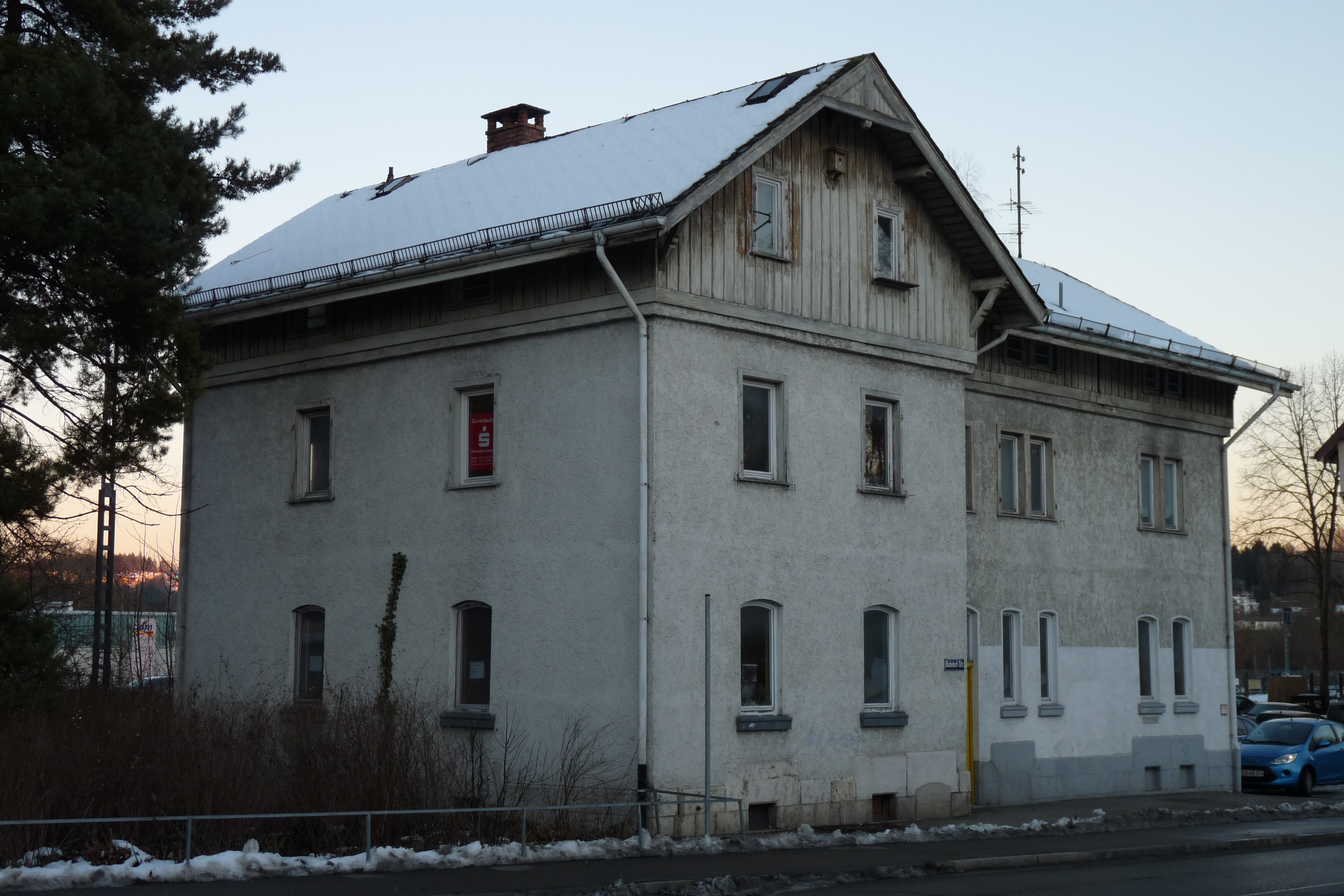 Baudenkmal Bahnhofstr. 1, Sigmaringen, Deutschland